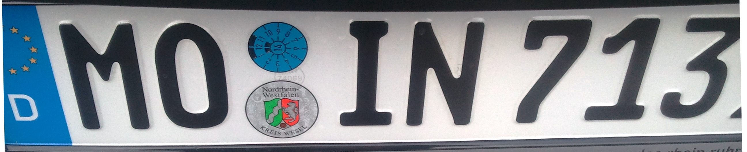 MOIN Kreis Wesel in Nordrhein-Westfalen